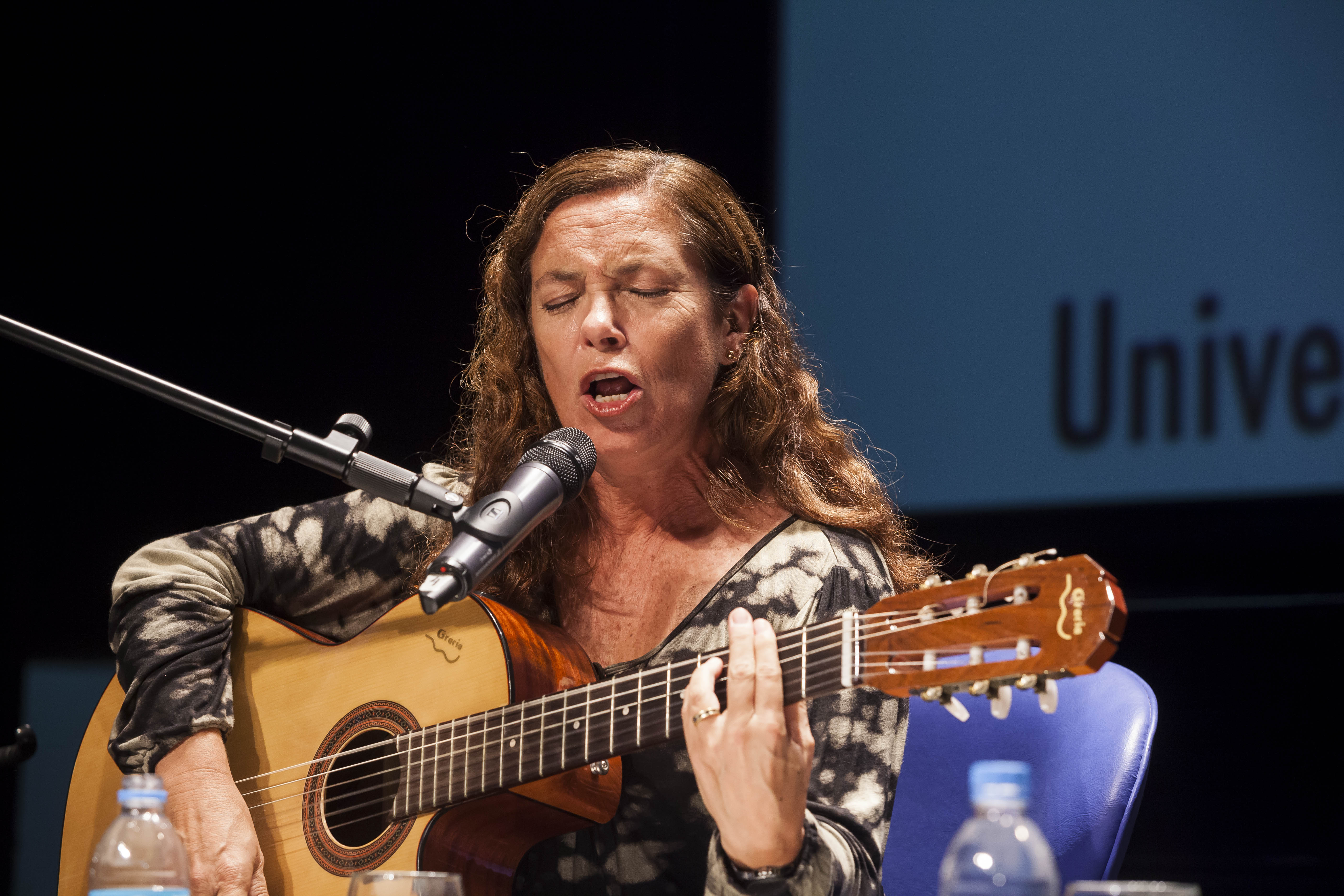 Sandra Mihanovich, cantante argentina, brindando un recital en la Universidad Metropolitana para la Educación y el Trabajo, en el marco del ciclo Historias de Pasión Xeneize. Buenos Aires, 21 de mayo de 2015.